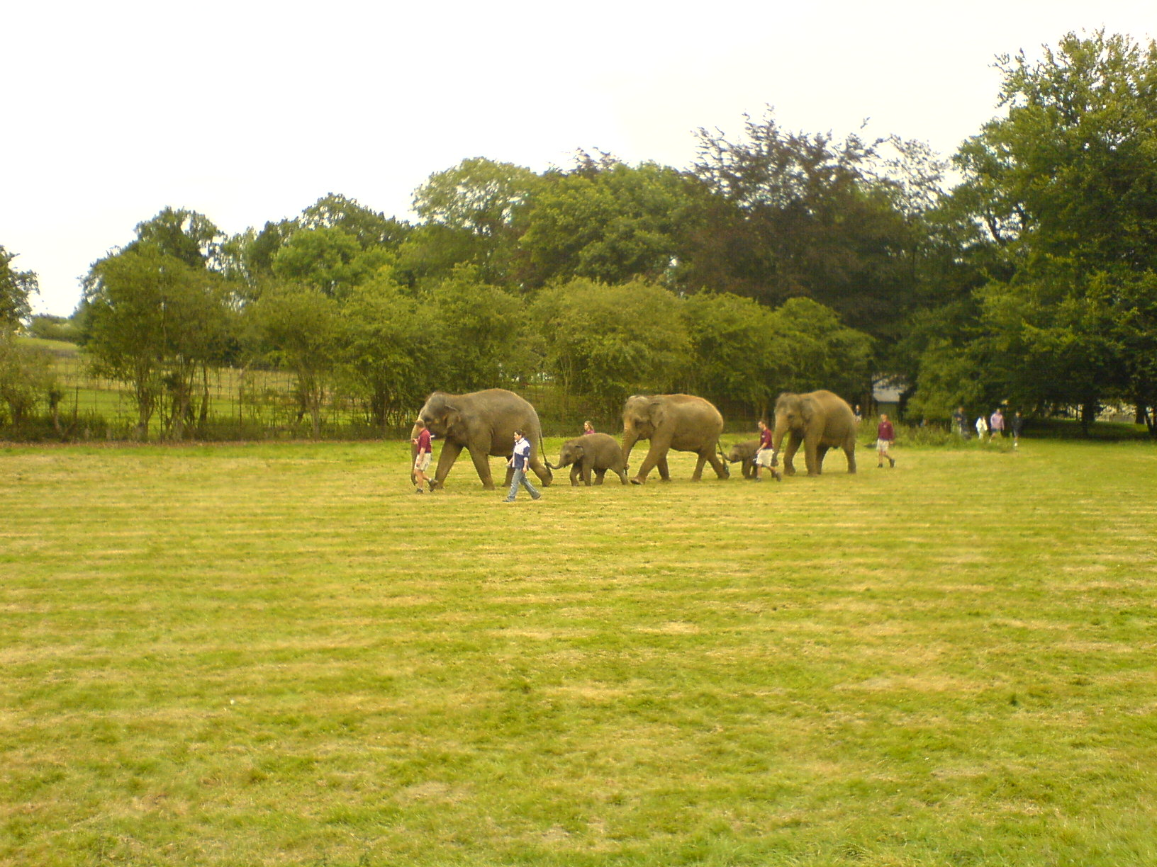 Elephants at Whipsnade